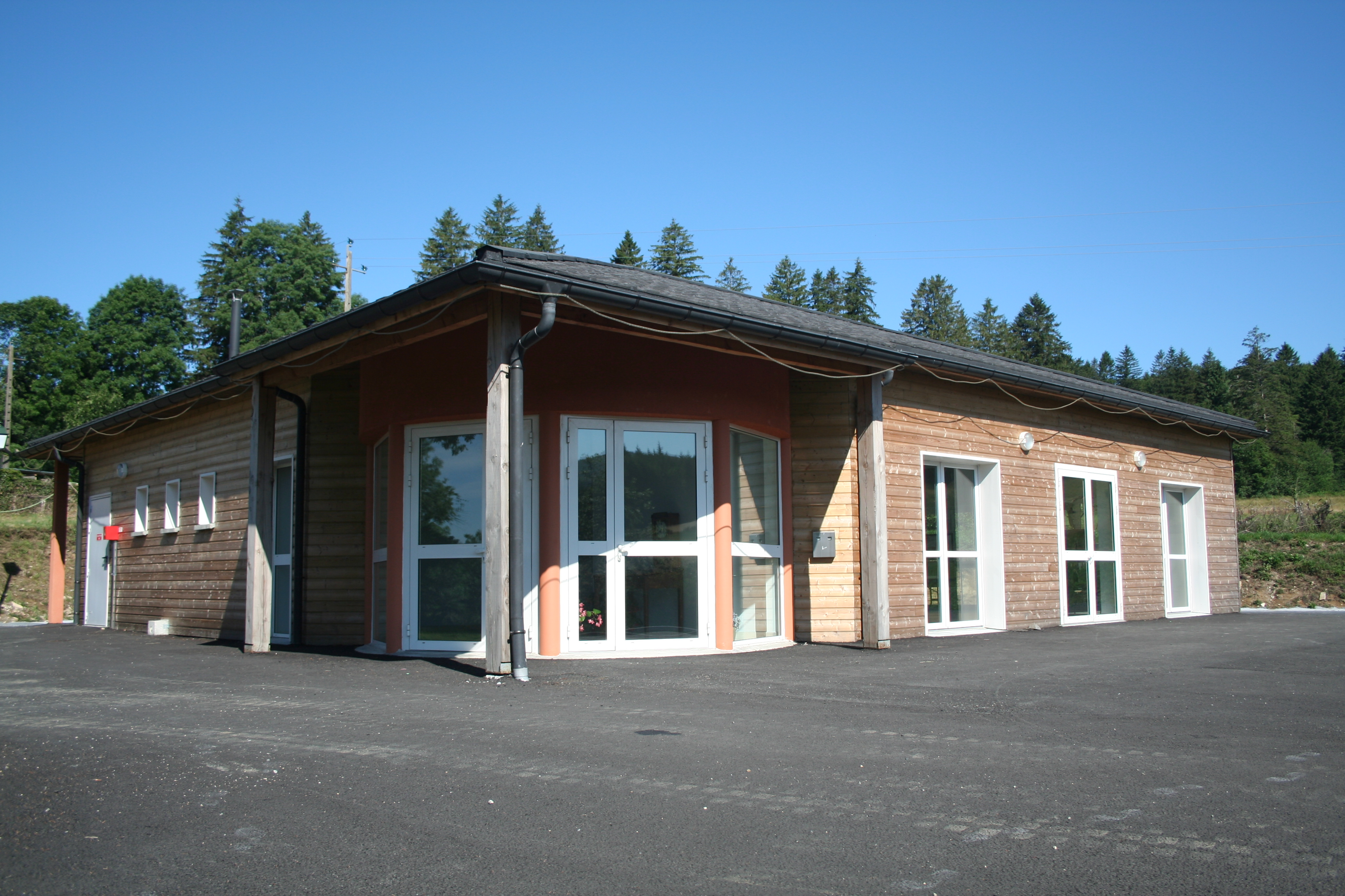 Lamontélarié (Tarn) - salle communale.